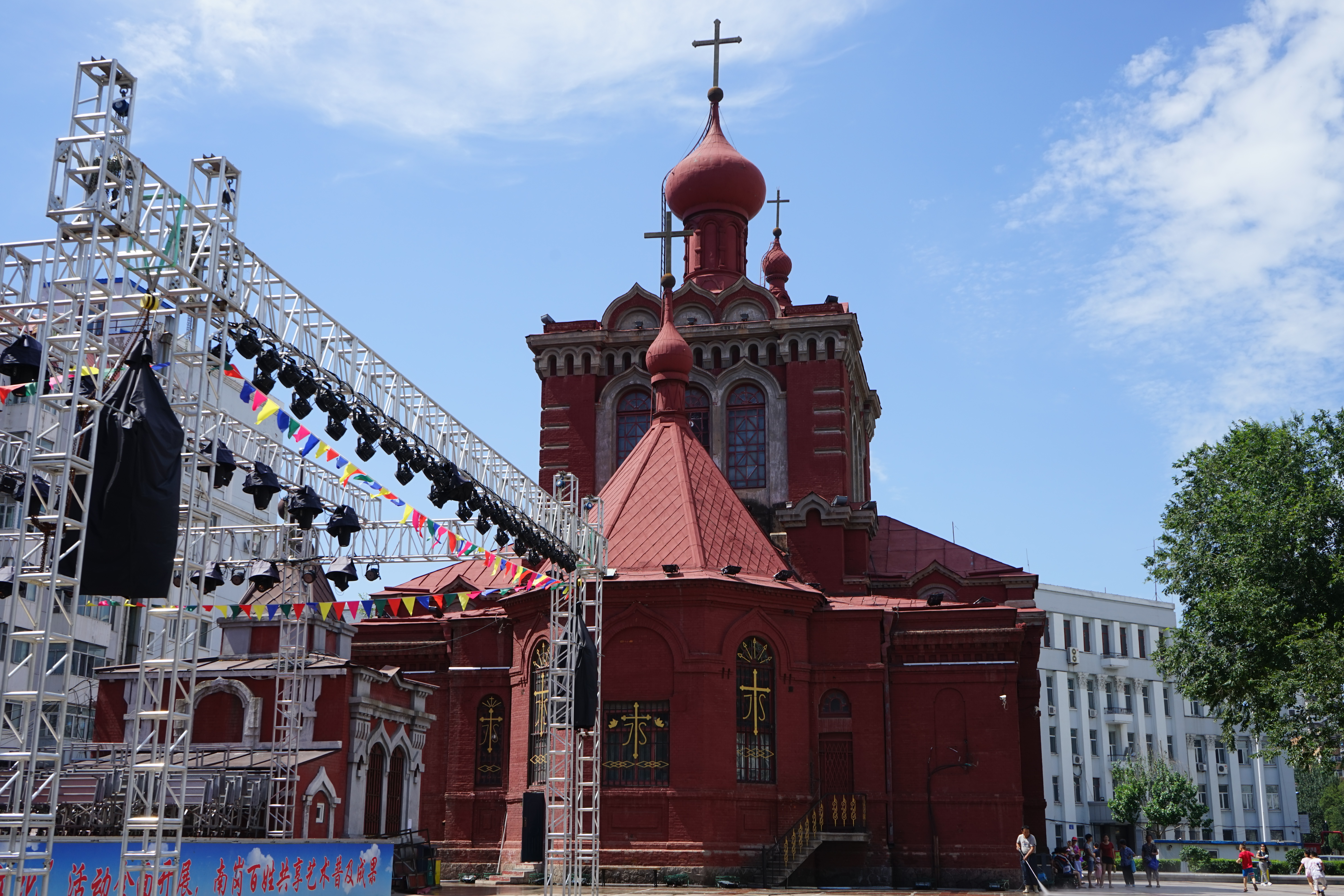 中文（中国大陆）: 哈尔滨天主教堂 从果戈里街一侧看